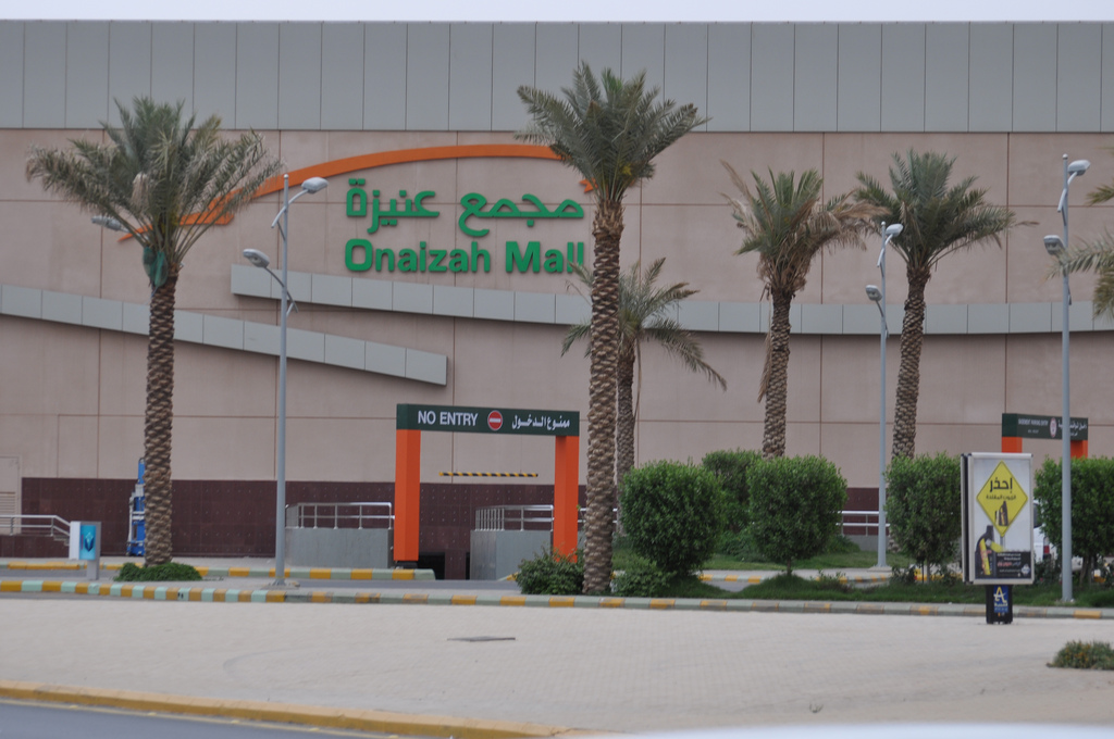 Unaizah Mall